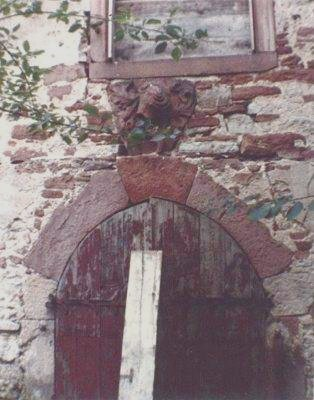 Gauangelloch, Schlossrest: Im Bild die aus Steinen der Burg erbaute, zum Zeitpunkt der Aufnahme längst profanierte Kapelle auf dem Gelände der Burg, der Wappenstein ist bald nach der Aufnahme entfernt (geklaut?) worden.